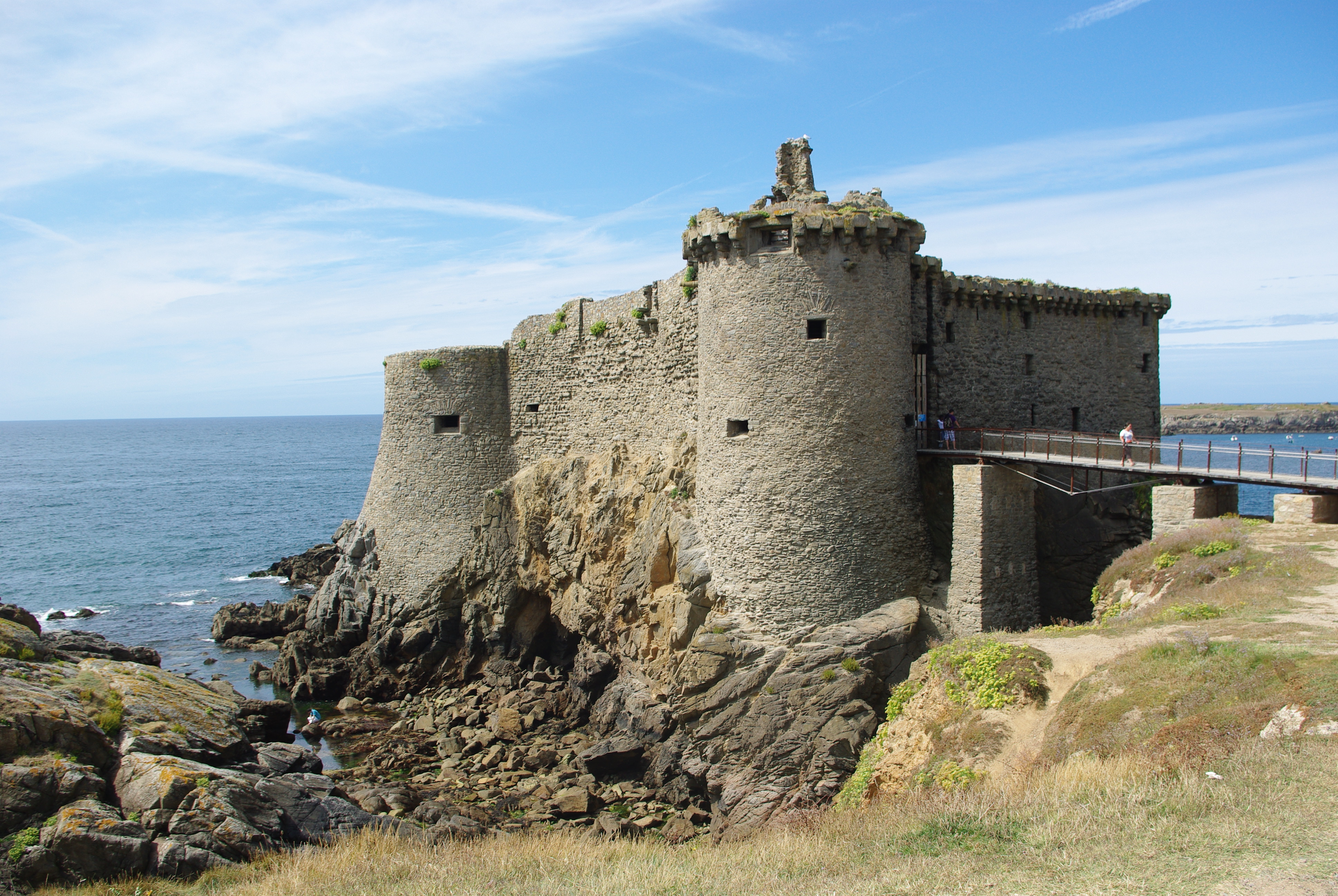 Vieux Château de l'Ile d'Yeu, Vendée, France